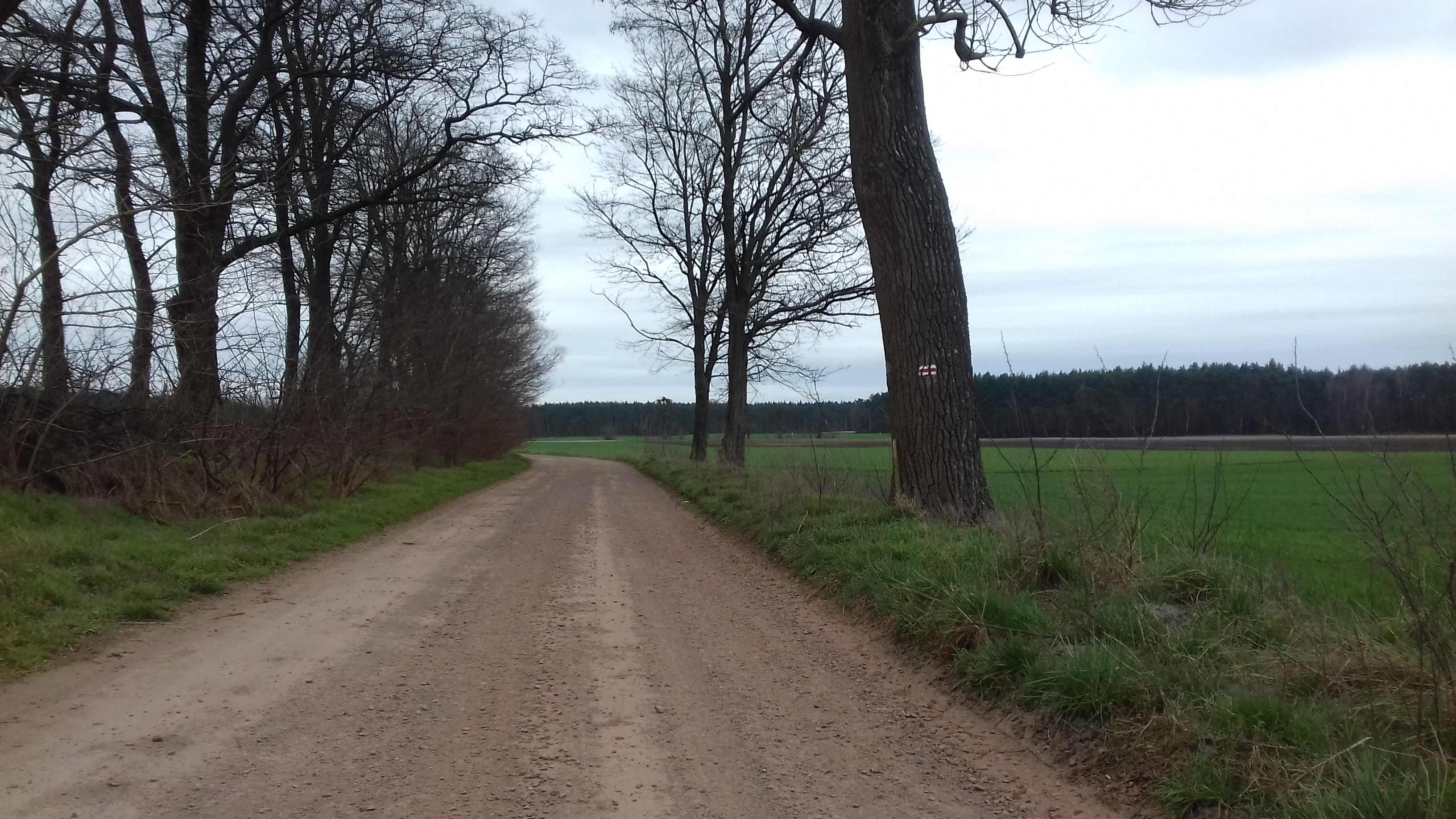 Szlak pieszy nr 3578 (czerwony) w okolicach Baranówka nad brzegiem kanału Szymanowo-Grzybno